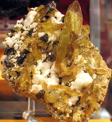 Fotografía de Pablo Alberto Salguero Quiles